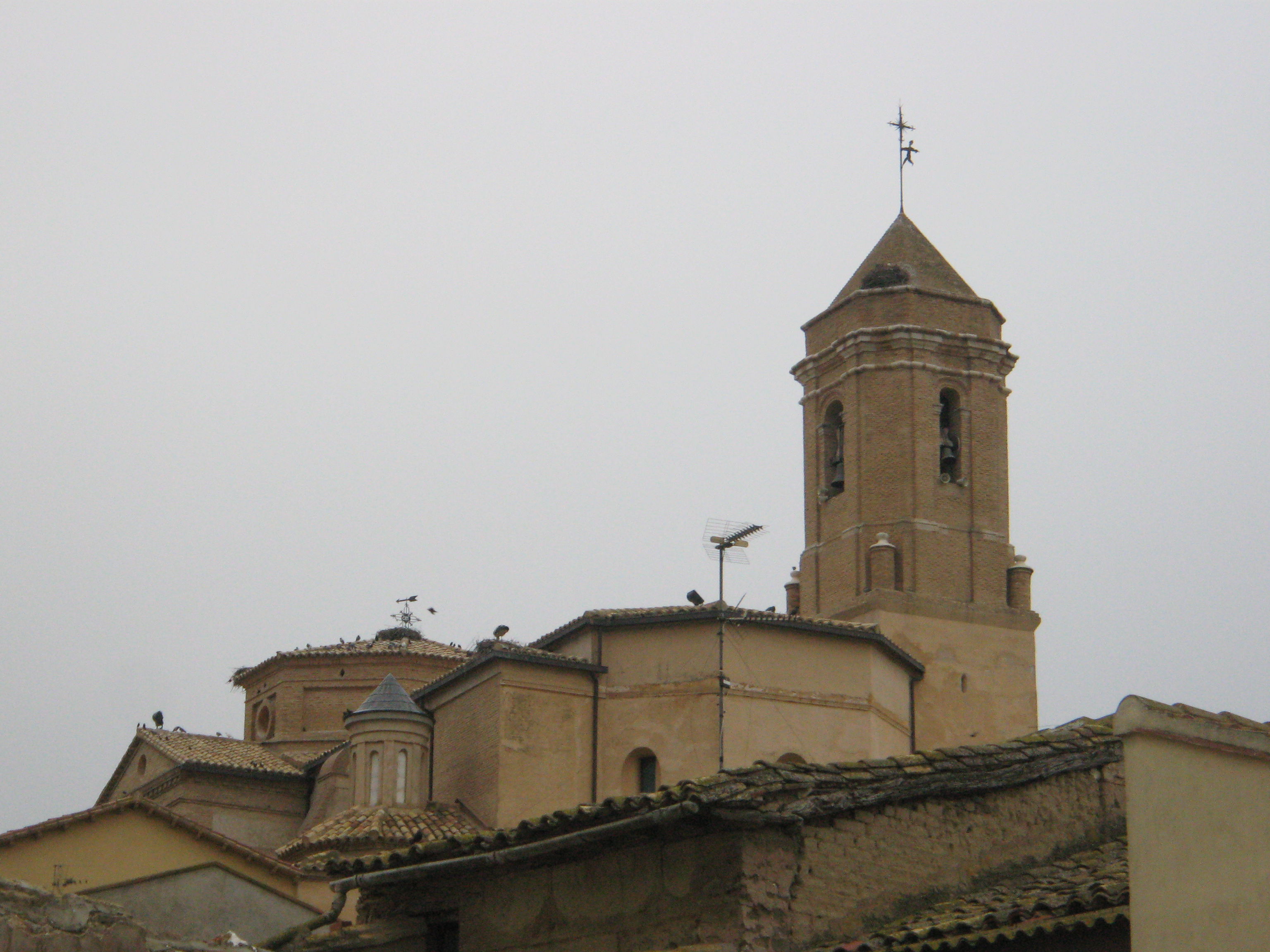 Iglesia Parroquial de Nuestra Señora de La Asunción, en el municipio español de Robres, Huesca.